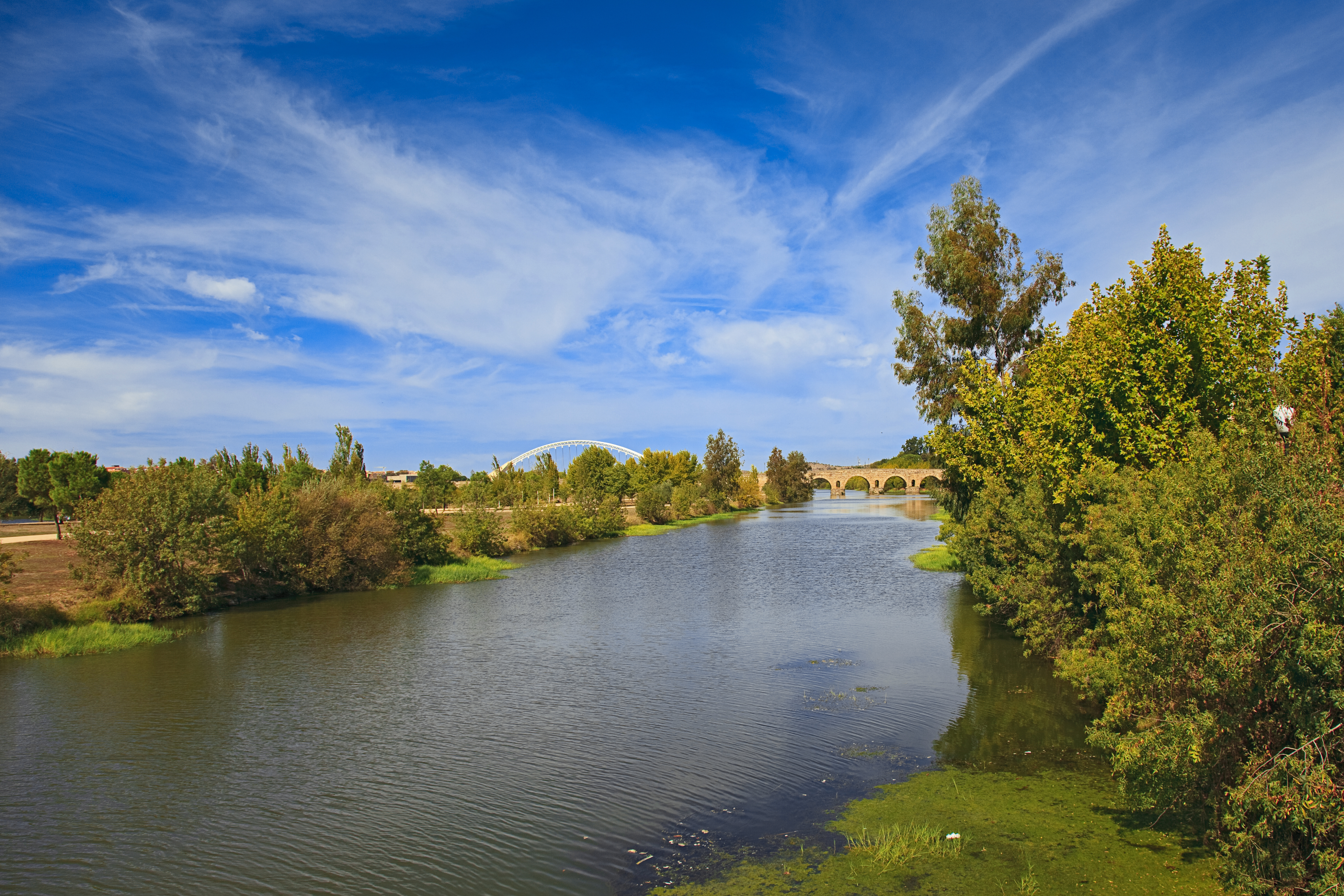 Mérida. Guadiana river. Badajoz. Extremadura. Spain